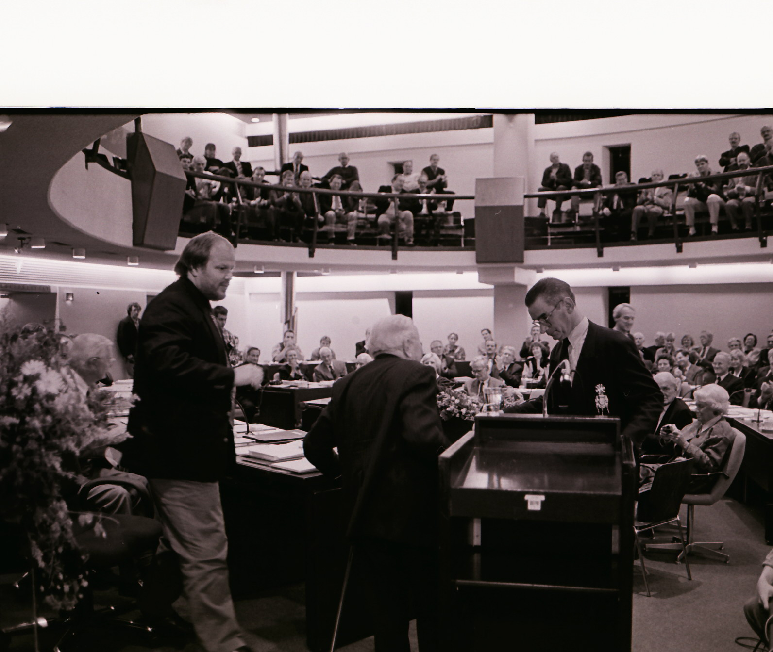 Airborne herdenking in de gemeente Ede (Bergstraat 4). In de raadzaal van het gemeentehuis in Ede werd aan generaal Sir John Hackett de erepenning van de gemeente Ede uitgereikt.